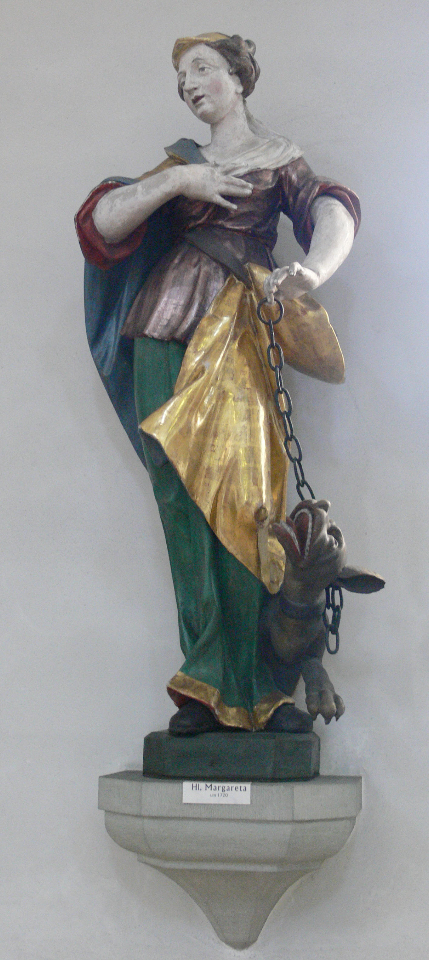 Pfarrkirche St. Johannes Baptist (ehem. Klosterkirche Unserer Lieben Frau), Baindt, Landkreis Ravensburg Heiligenfigur „Margaretha" mit dem Höllendrachen